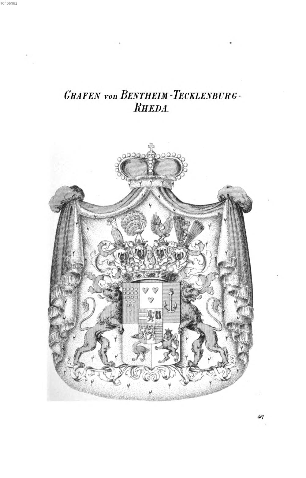 Wappen Bentheim Tecklenburg Rheda 2 - Tyroff HA.jpg